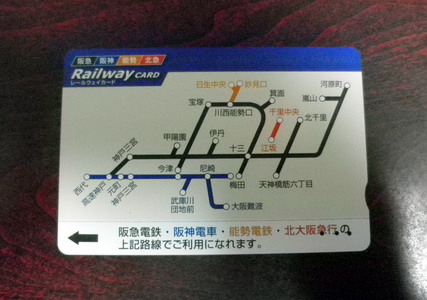 阪急阪神レールウェイカード